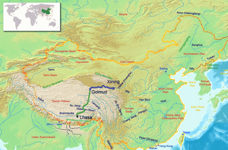 Kaart van de Qingzang spoorweg (Peking-Lhasa). Inspired by a graphic at Partly based on Image:ChinaGeography.png